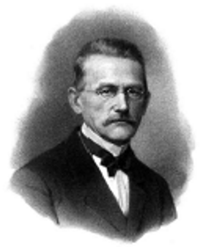 Nachruf auf Georg Erbkam, Porträt um 1870